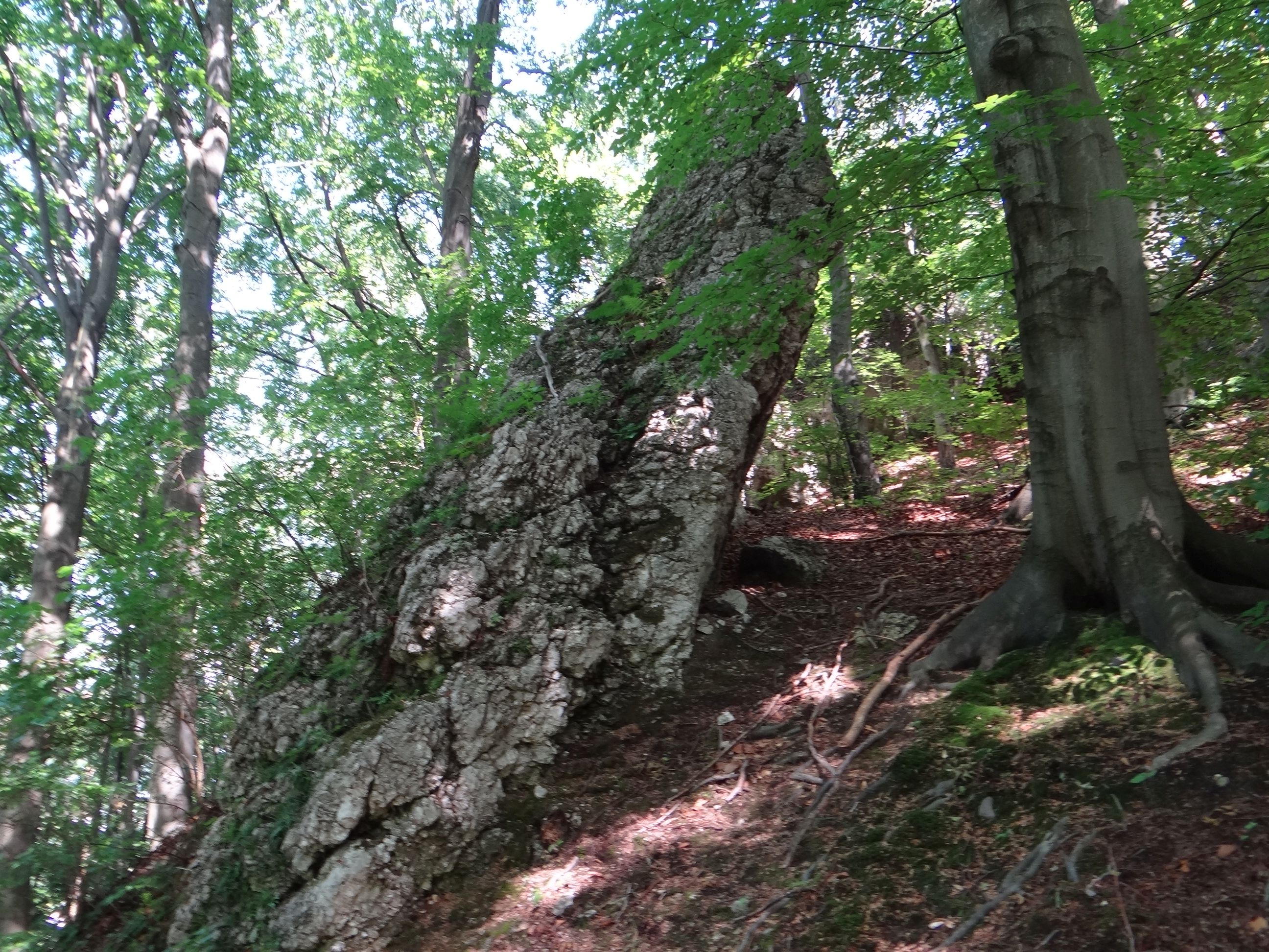 Kubińcowe Skały w Pierunkowym Dole w Nielepicach